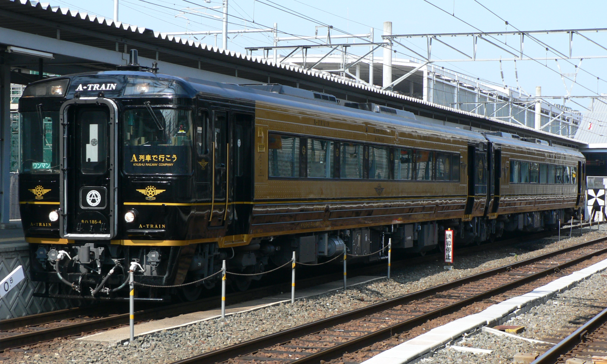 特急「A列車で行こう」用キハ185系 (キハ185-4 + キハ185-1012)